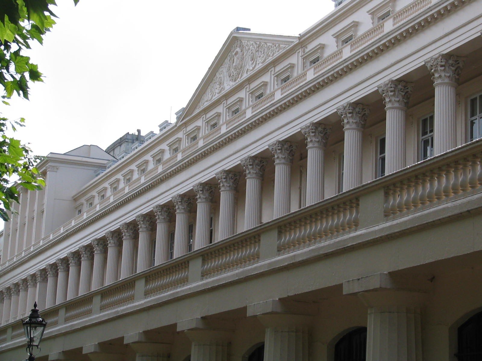 Carlton House Terrace, London. Bis 1945 Sitz der Deutschen Botschaft London.